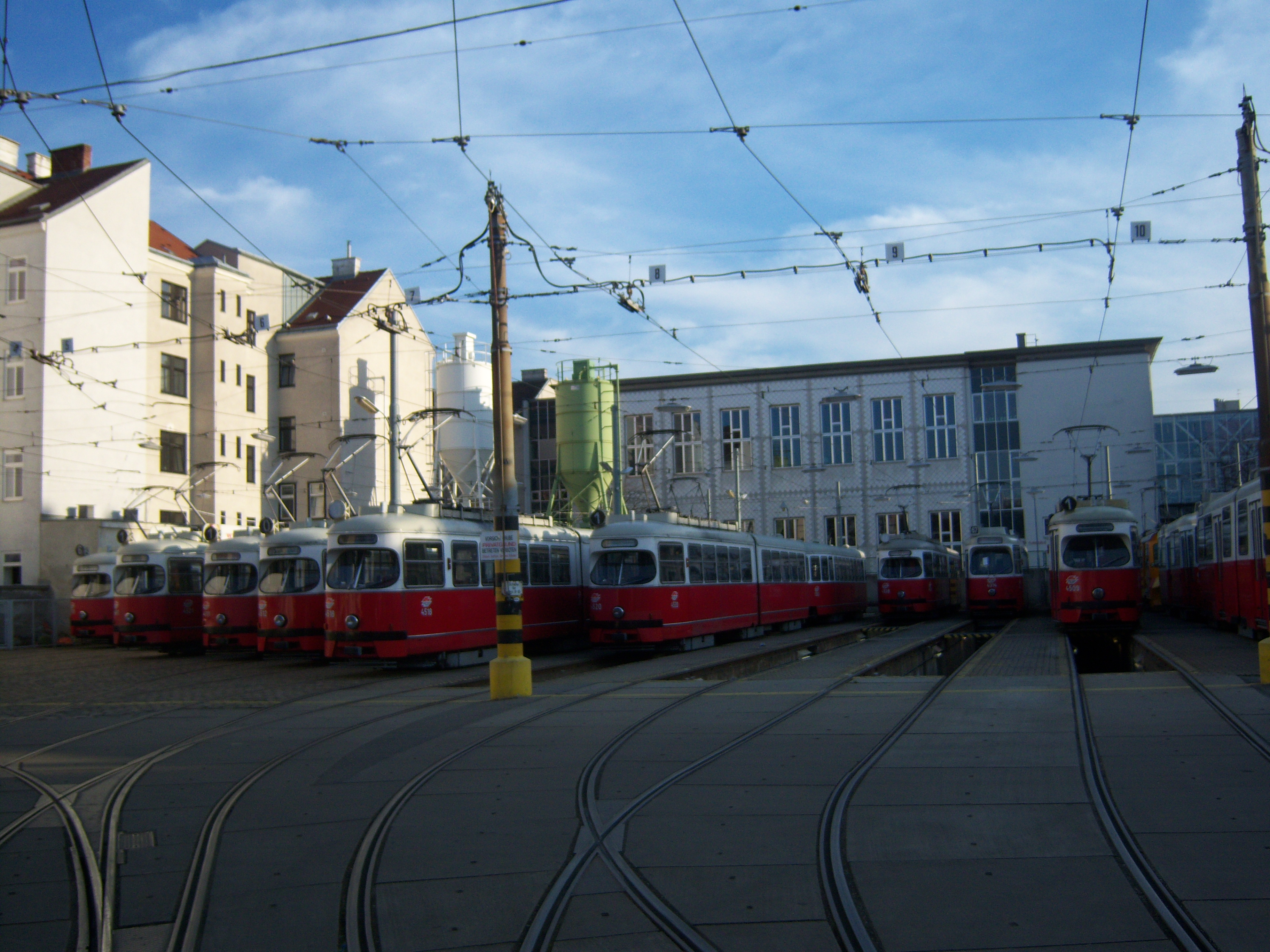 Betriebsbahnhof Favoriten